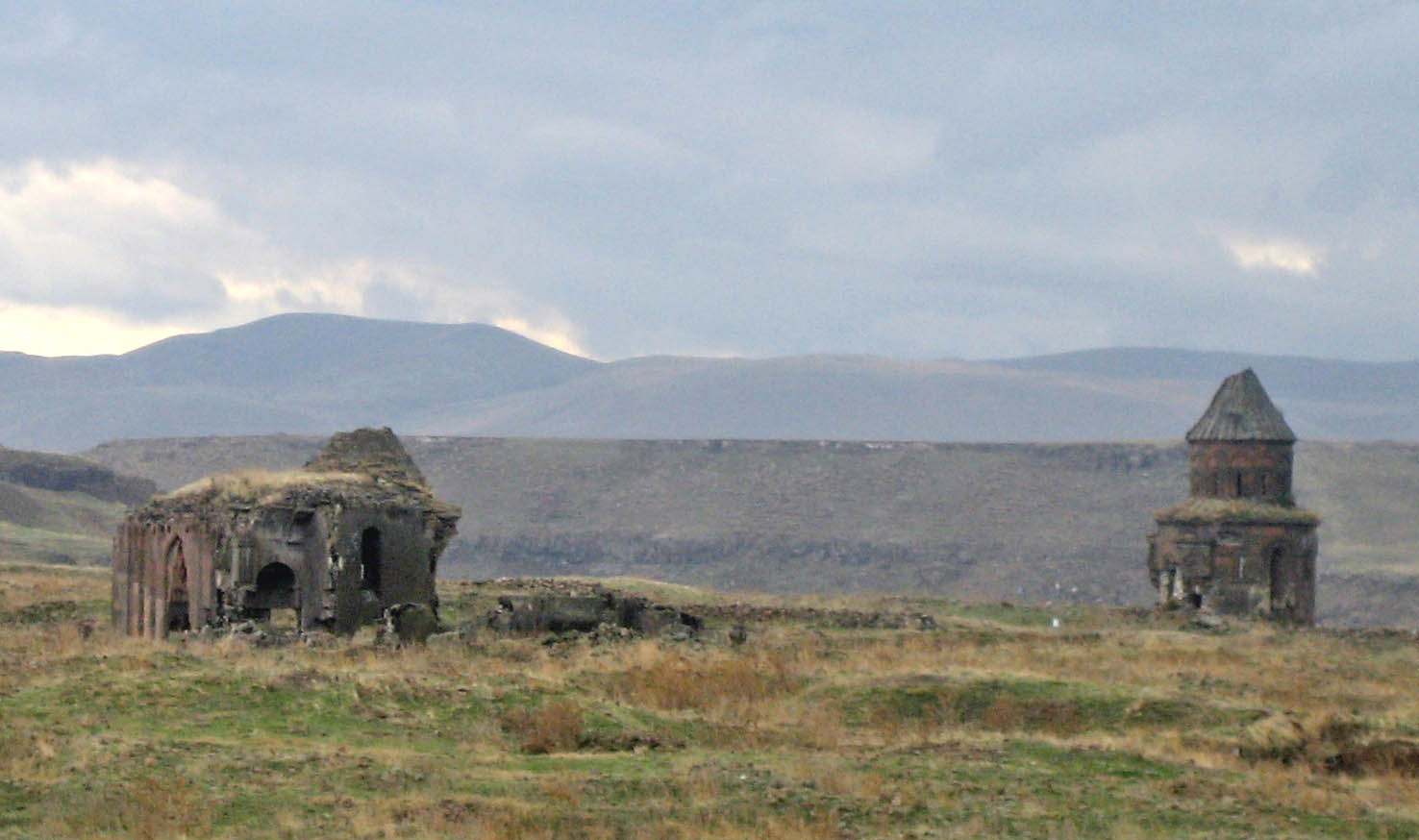 Ani Aziz Grigor Kilisesi Aziz Arakletos Kilisesi